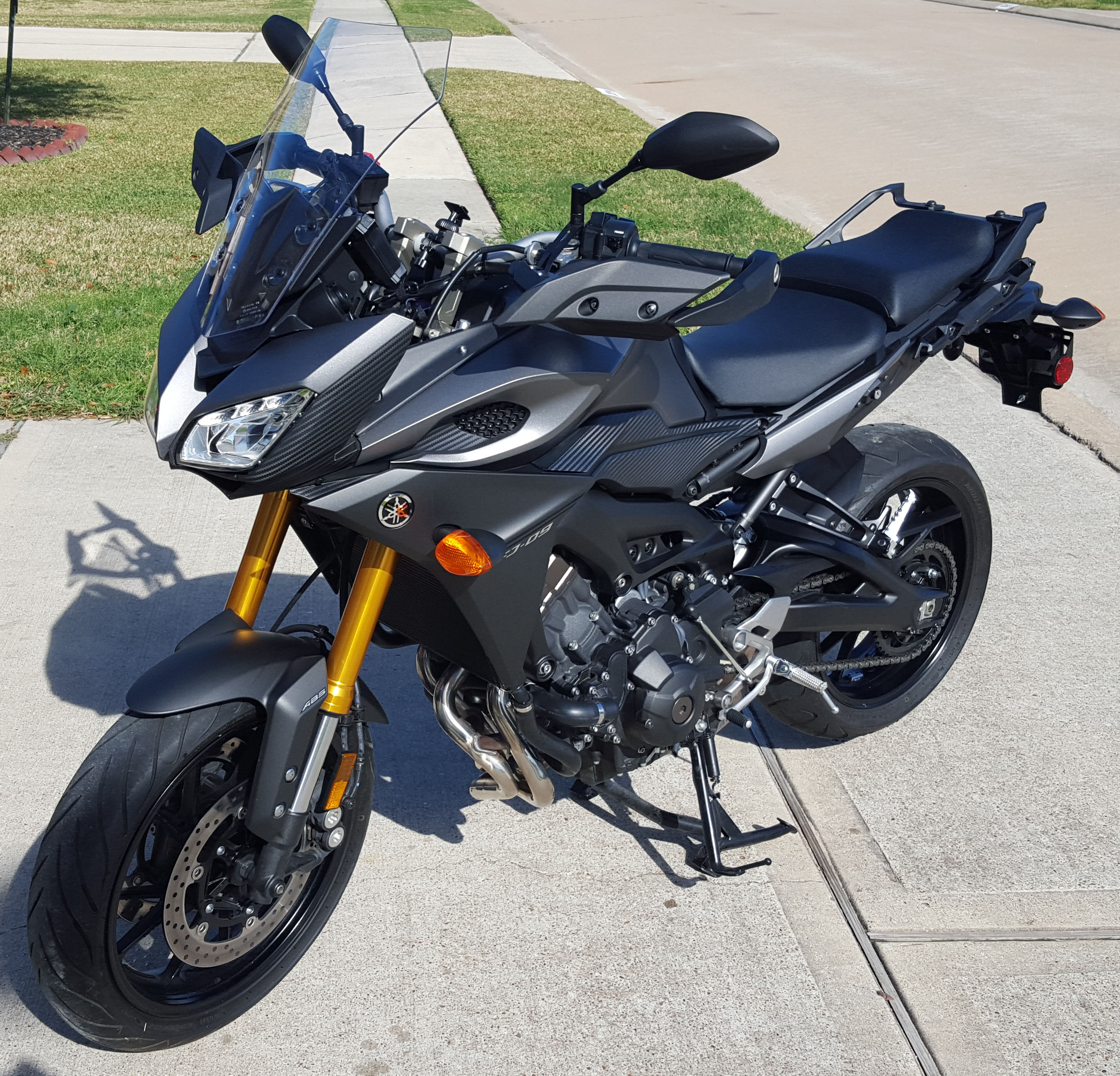 Yamaha MT-09 Tracer (FJ-09)